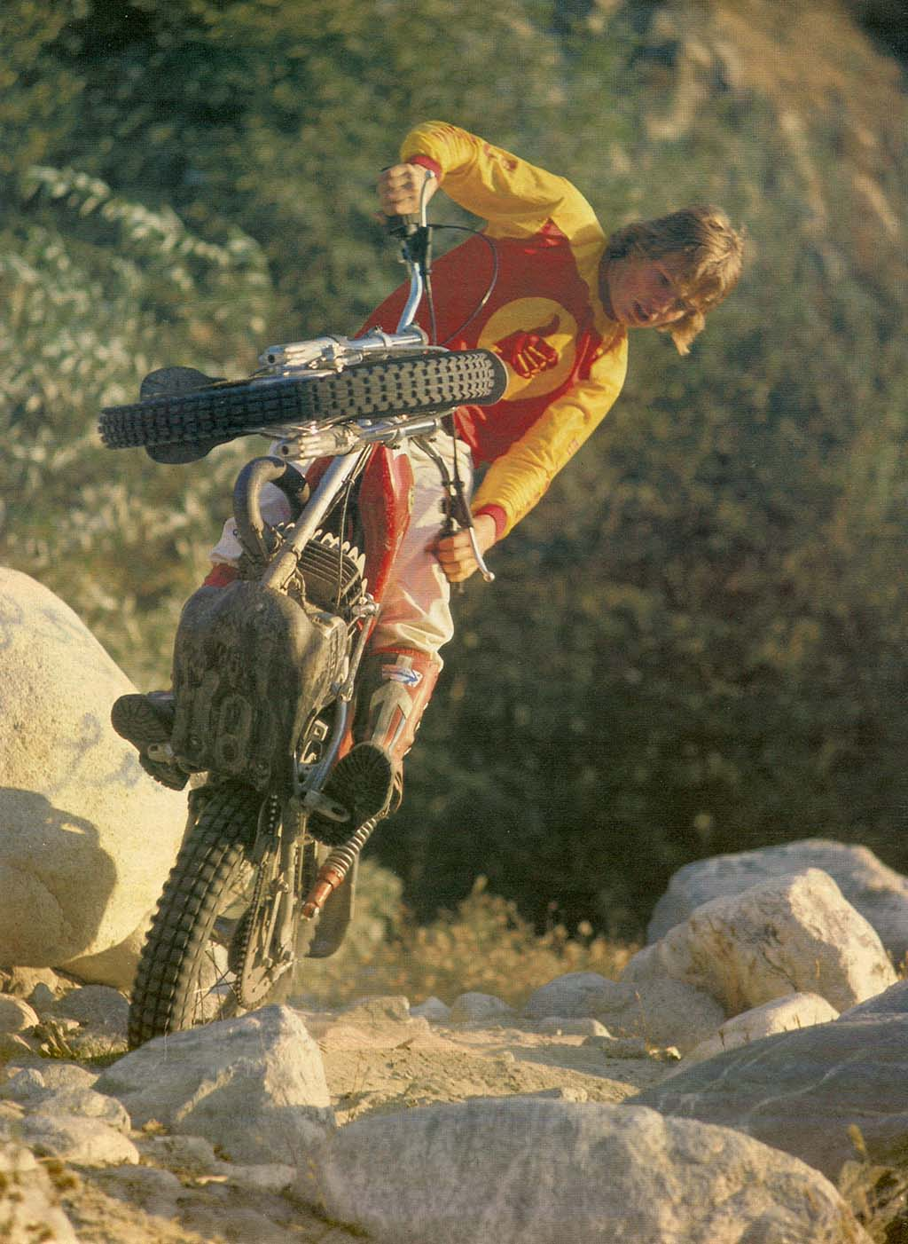 Bernie Schreiber on a Bultaco Sherpa T (circa 1975)